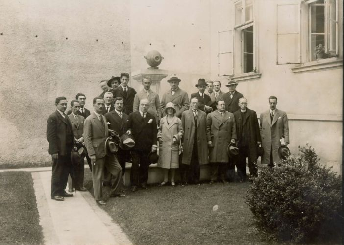 Zborovanje jugoslovanskega Pen - kluba v Ljubljani leta 1929 (France Stele, Stanko Leben, Ferdo Kozak, Branimir Livadić, Velmar Jankovič, Manojlovič, Desanka Maksimović, Oton Župančič, Igo Gruden, Franc Saleški Finžgar, Veljko Petrovič, Božidar Borko, Juš Kozak, Miran Jarc, Bogdanovič, Alojz Gradnik, France Koblar, Fran Albreht)